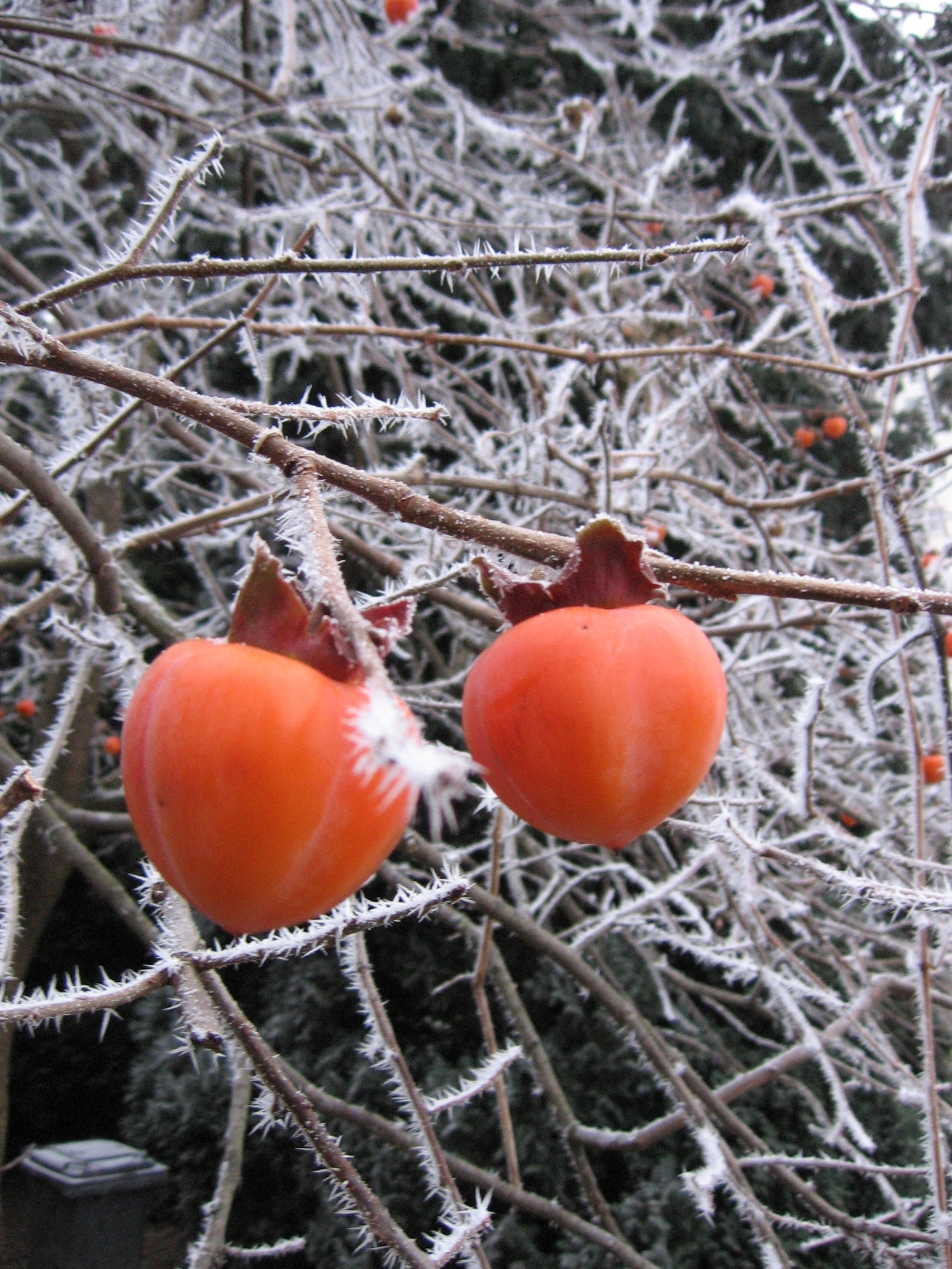 Des fruits de Kaki sous le givre